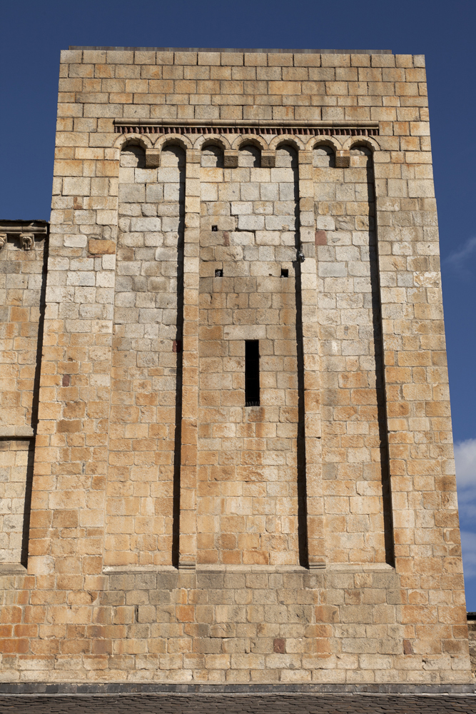 unidentified Spain